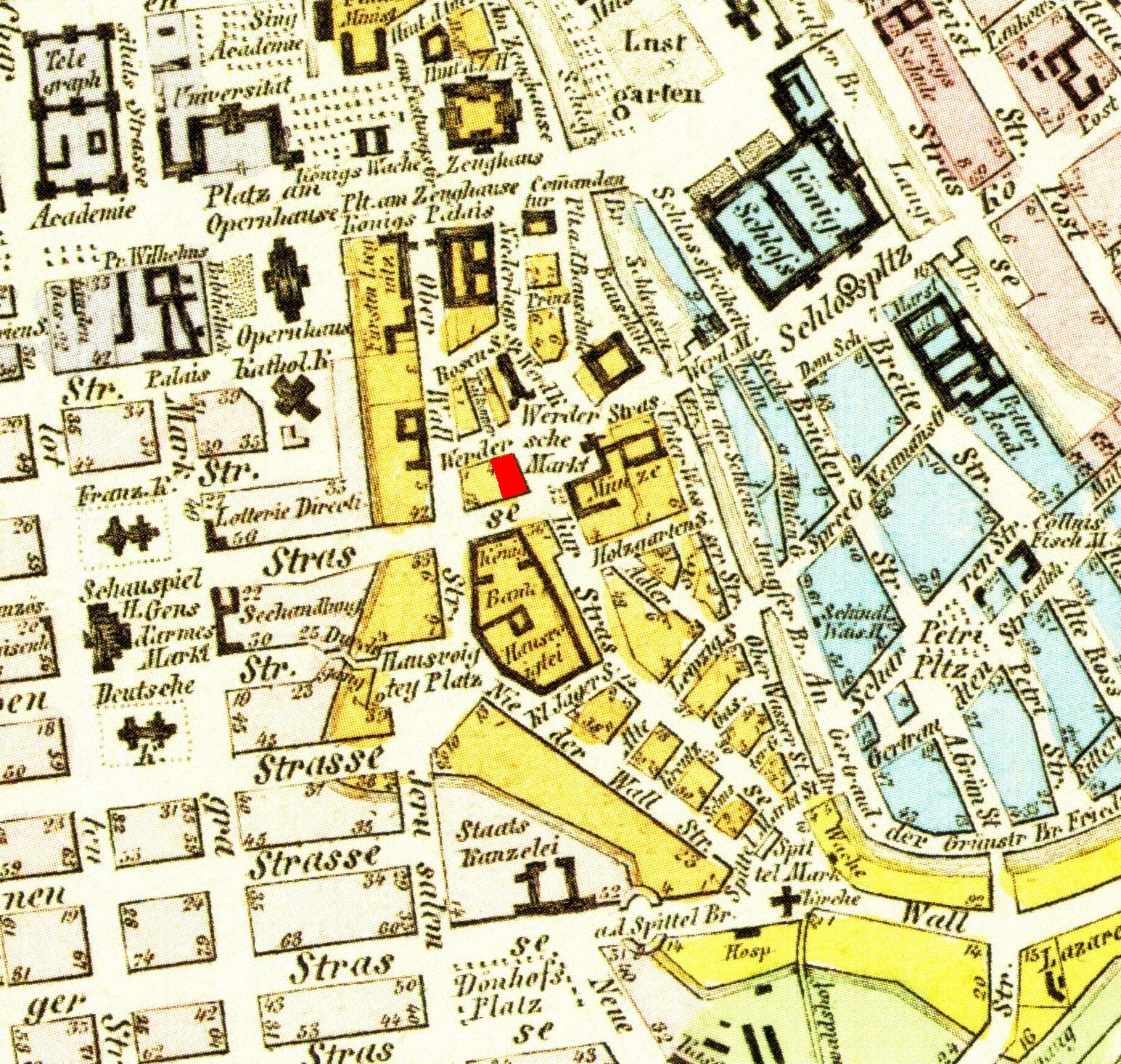 Lage des Kaufhauses Gerson am Werderschen Markt in Berlin 1849.